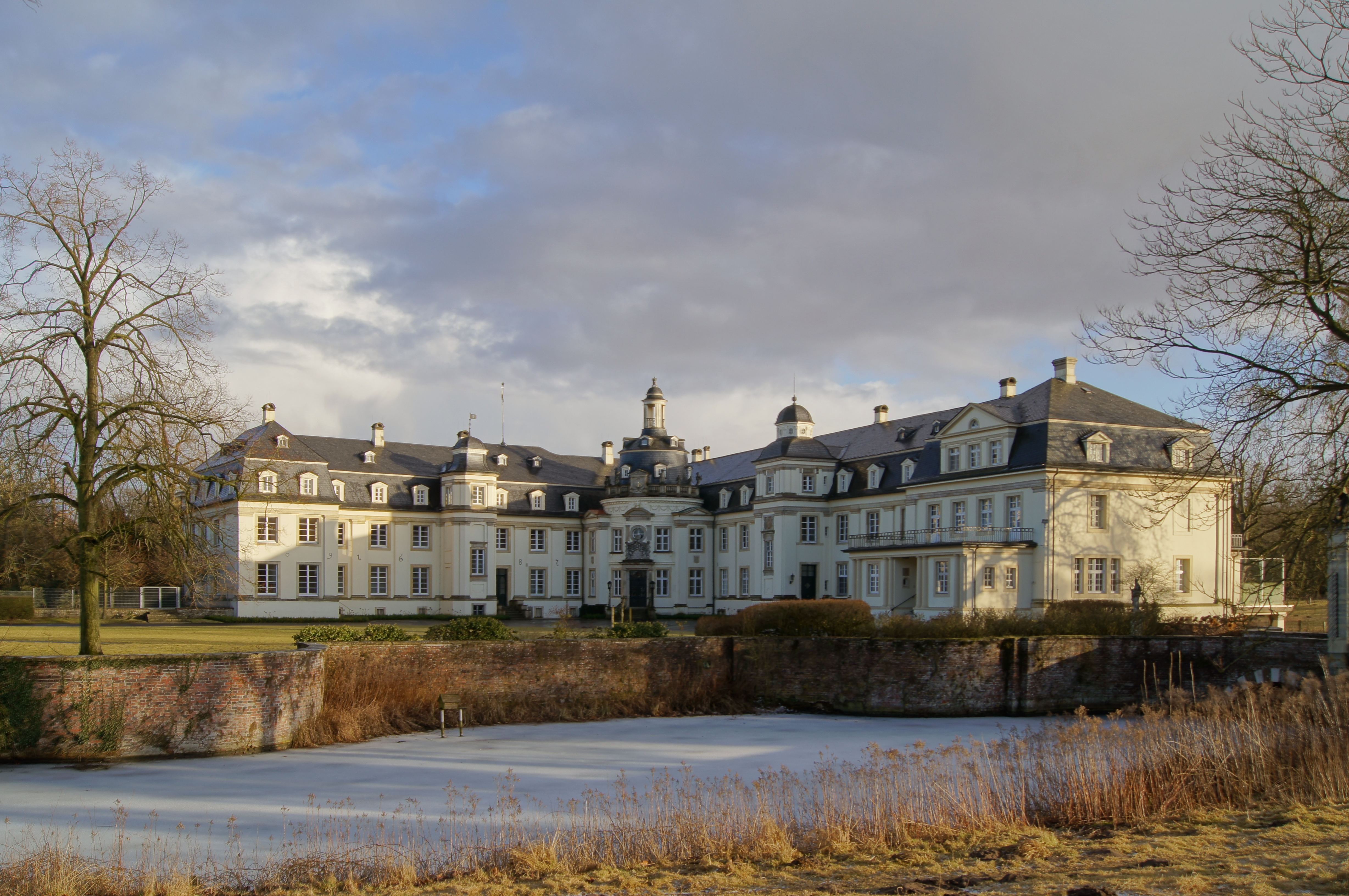 Schloss Varlar zwischen Coesfeld und Osterwick.